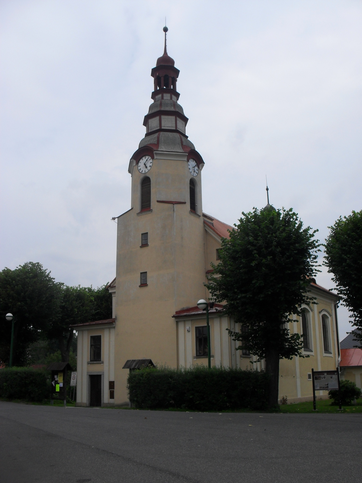 Kostel sv. Kateřiny Alexandrijské